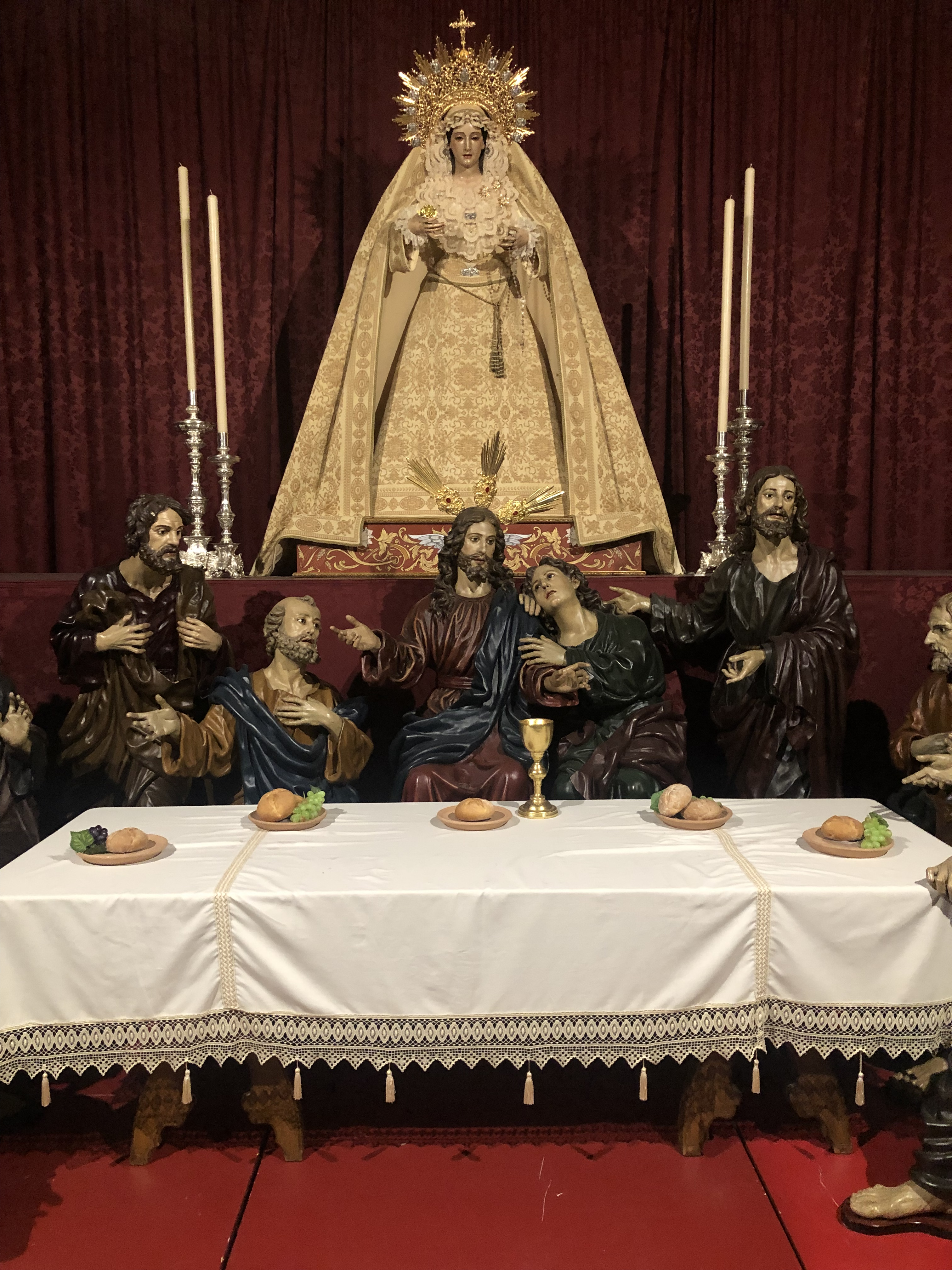 Virgen de la victoria y el Cristo de la cena, granada en el templo de Santo Domingo.